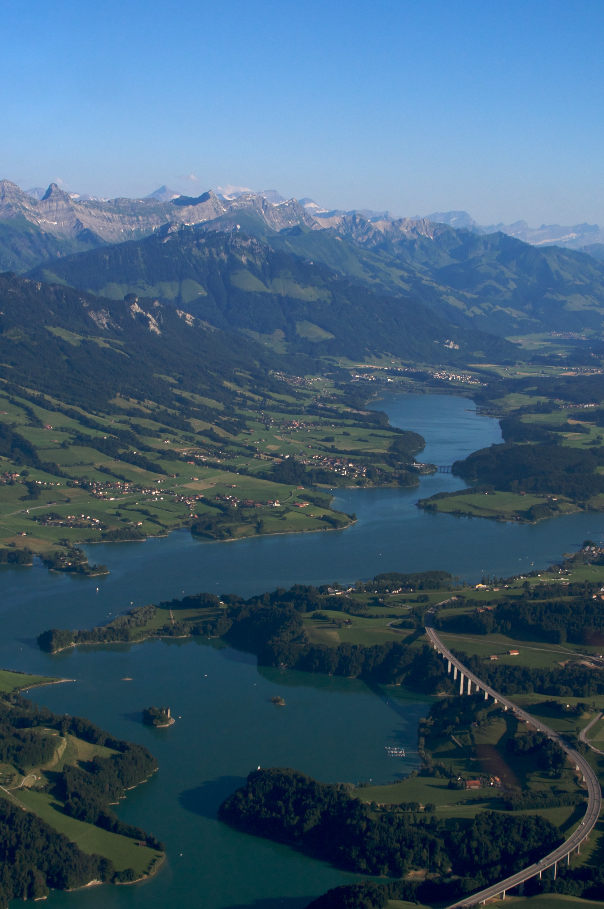 Lac de la Gruyère, Fribourg region.